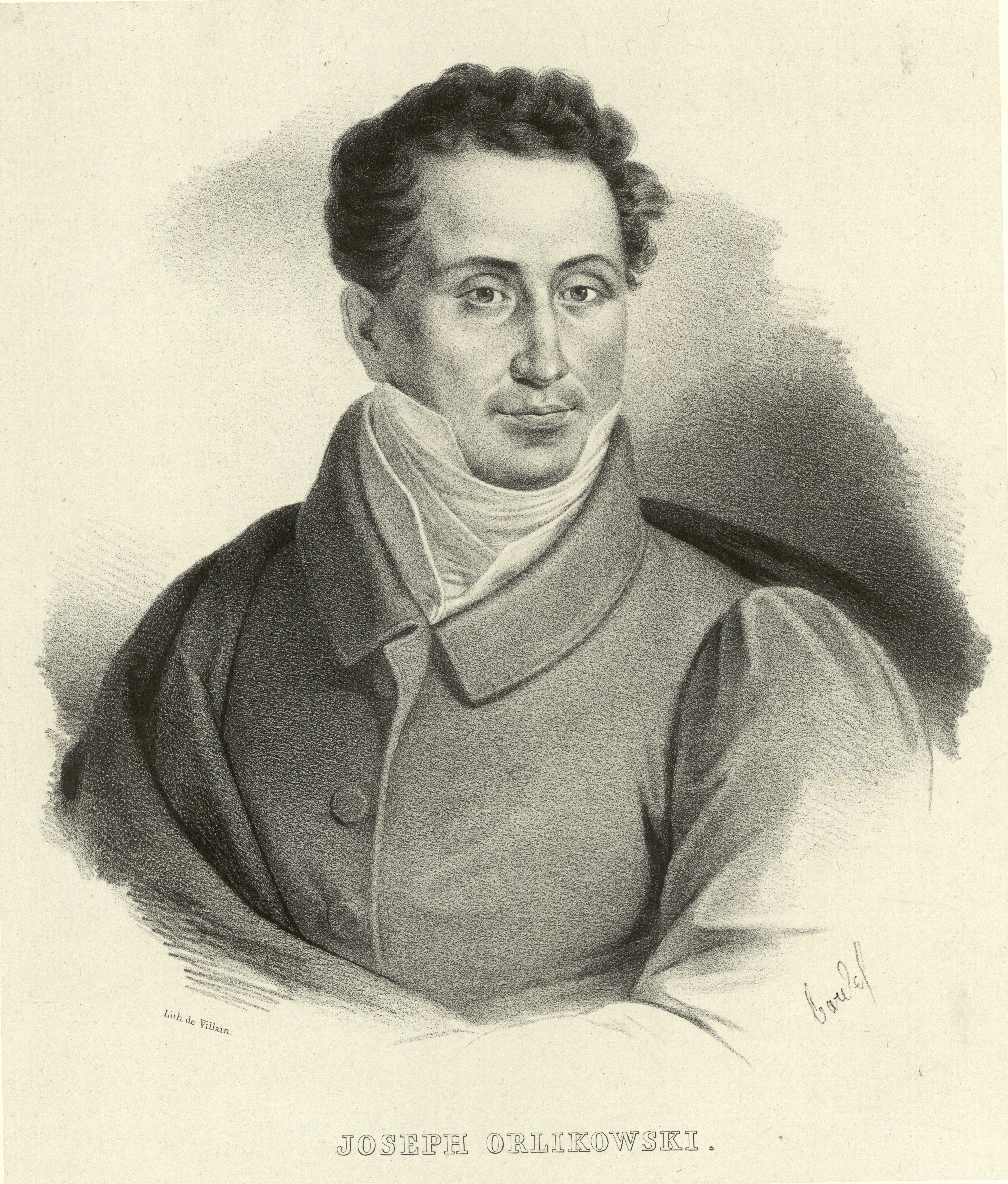 Józef Orlikowski